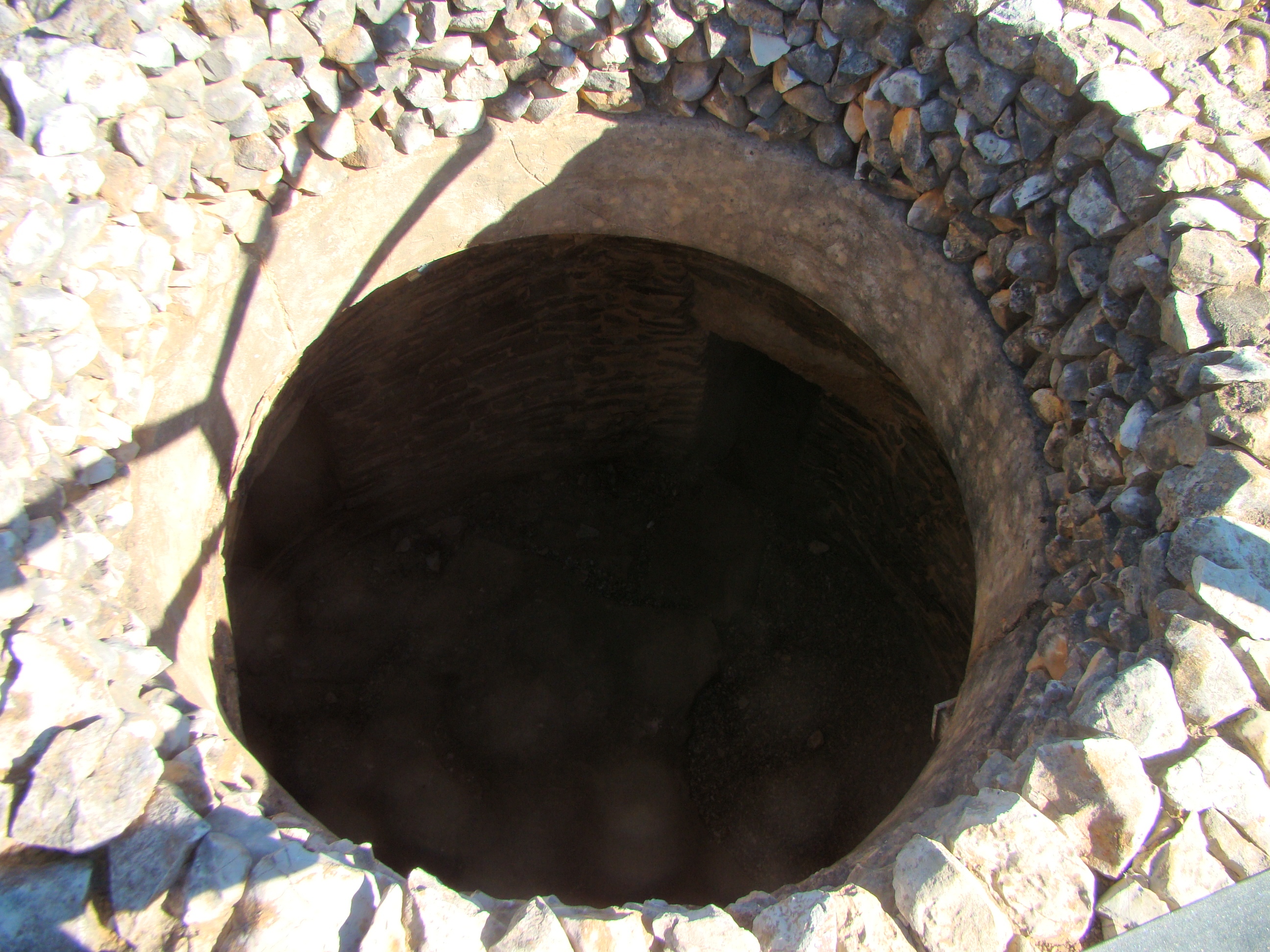 Centro de Alcalar 2017 - Necropole 1